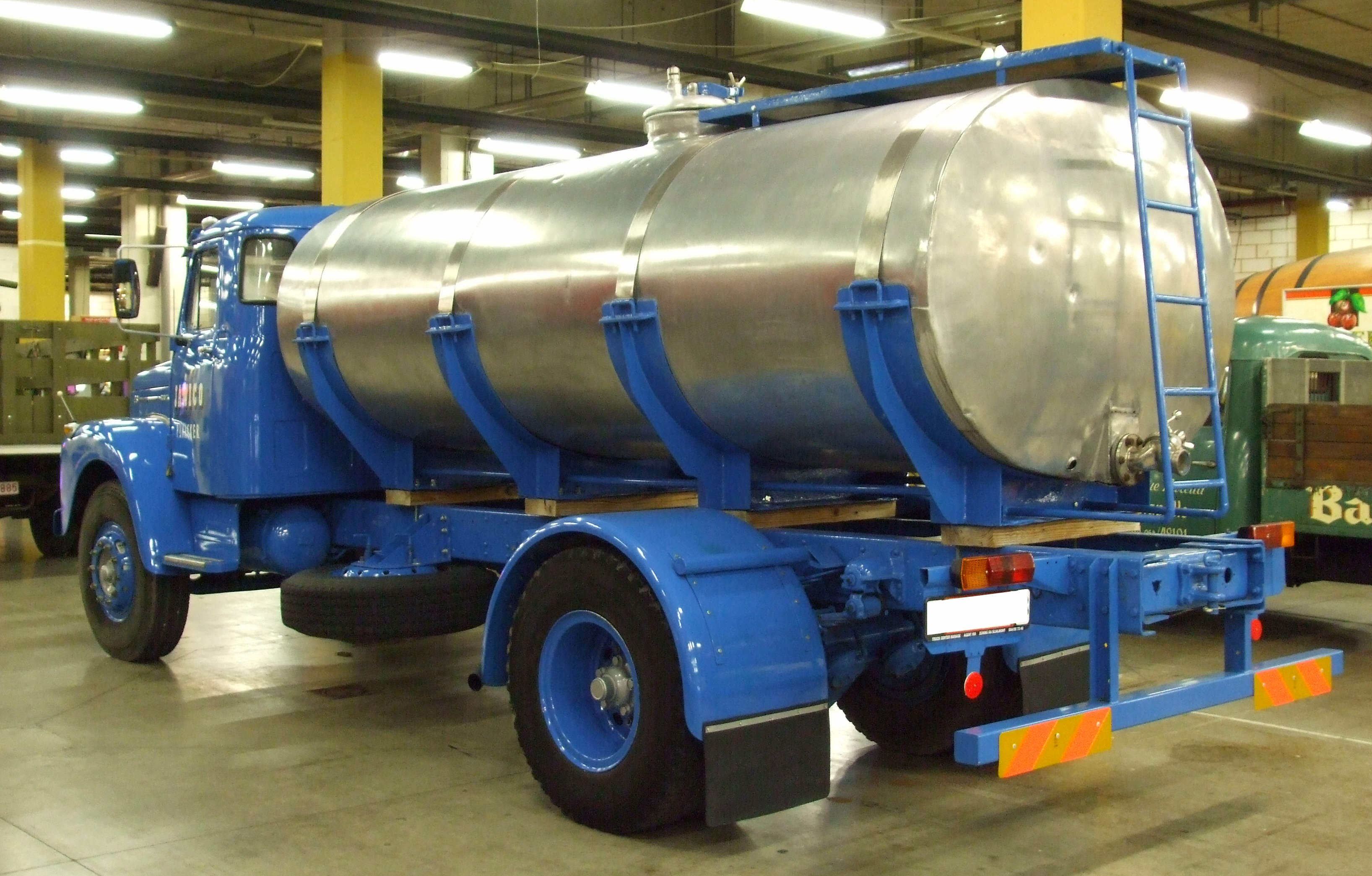 Scania-Vabis 66 Tankwagen bei der Retro in La Louvière